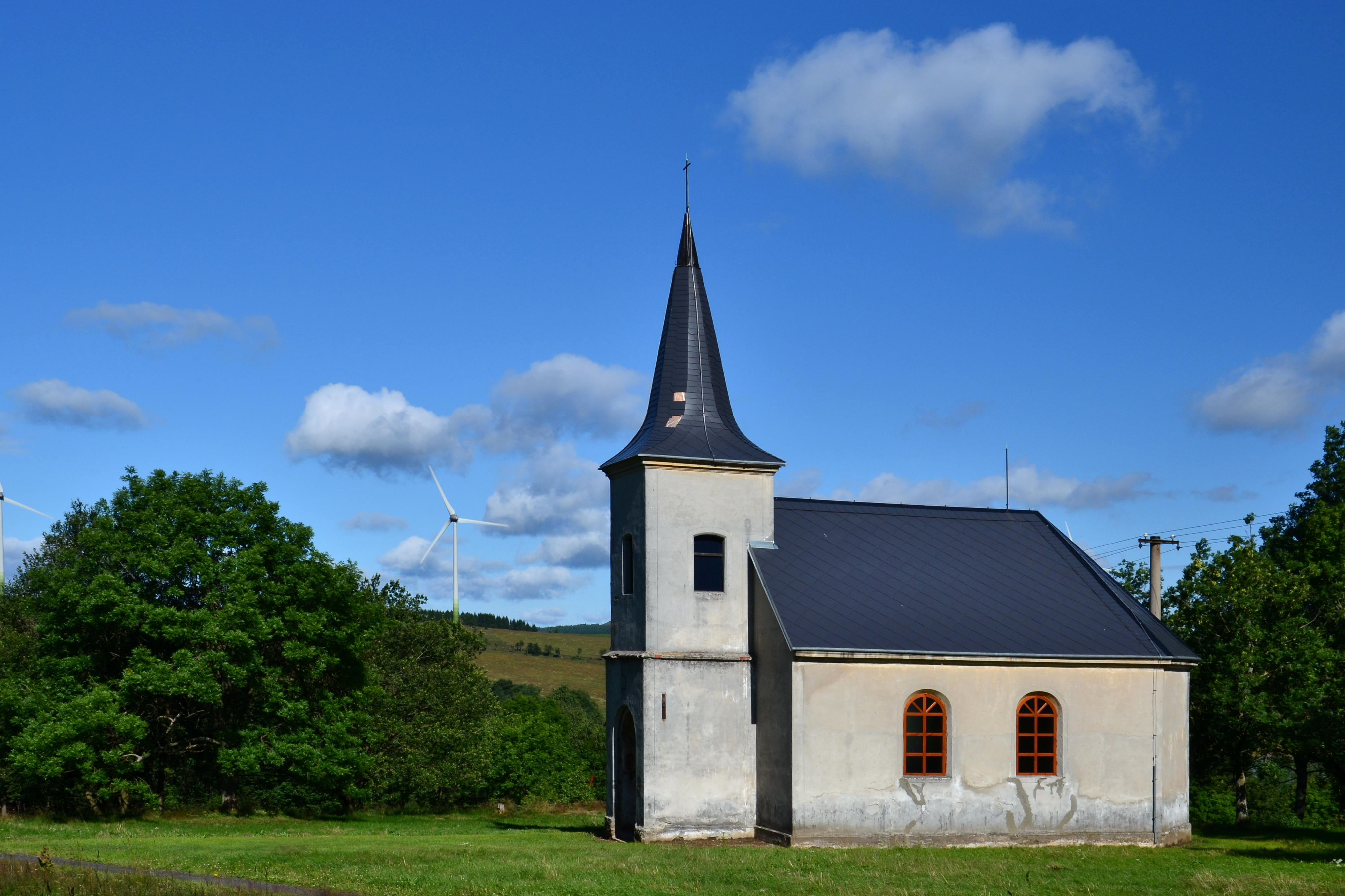 Kotlina - opravená kaple svaté Anny